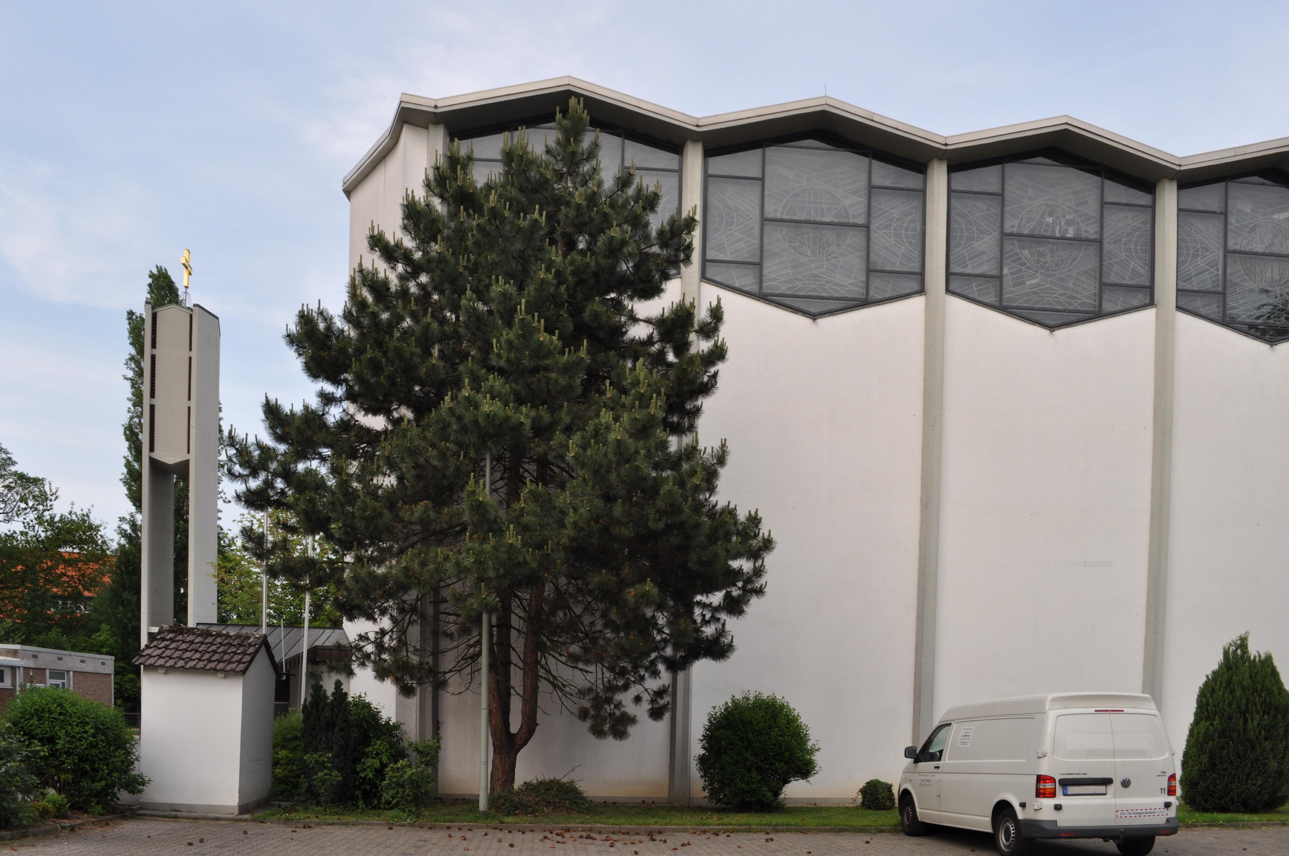 Katholische Kirche St. Crutzen in Weißkirchen